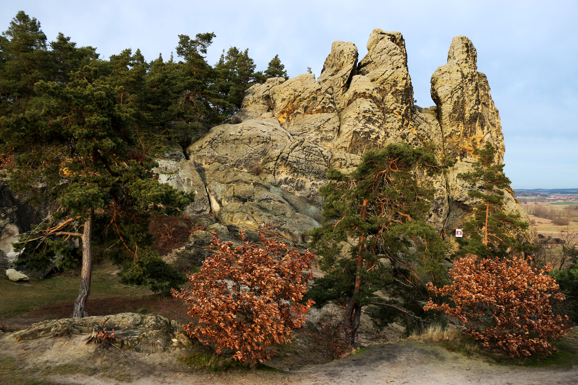 Das so genannte Hamburger Wappen ist eine Felsformation innerhalb der Teufelsmauer bei Blankenburg / Harz